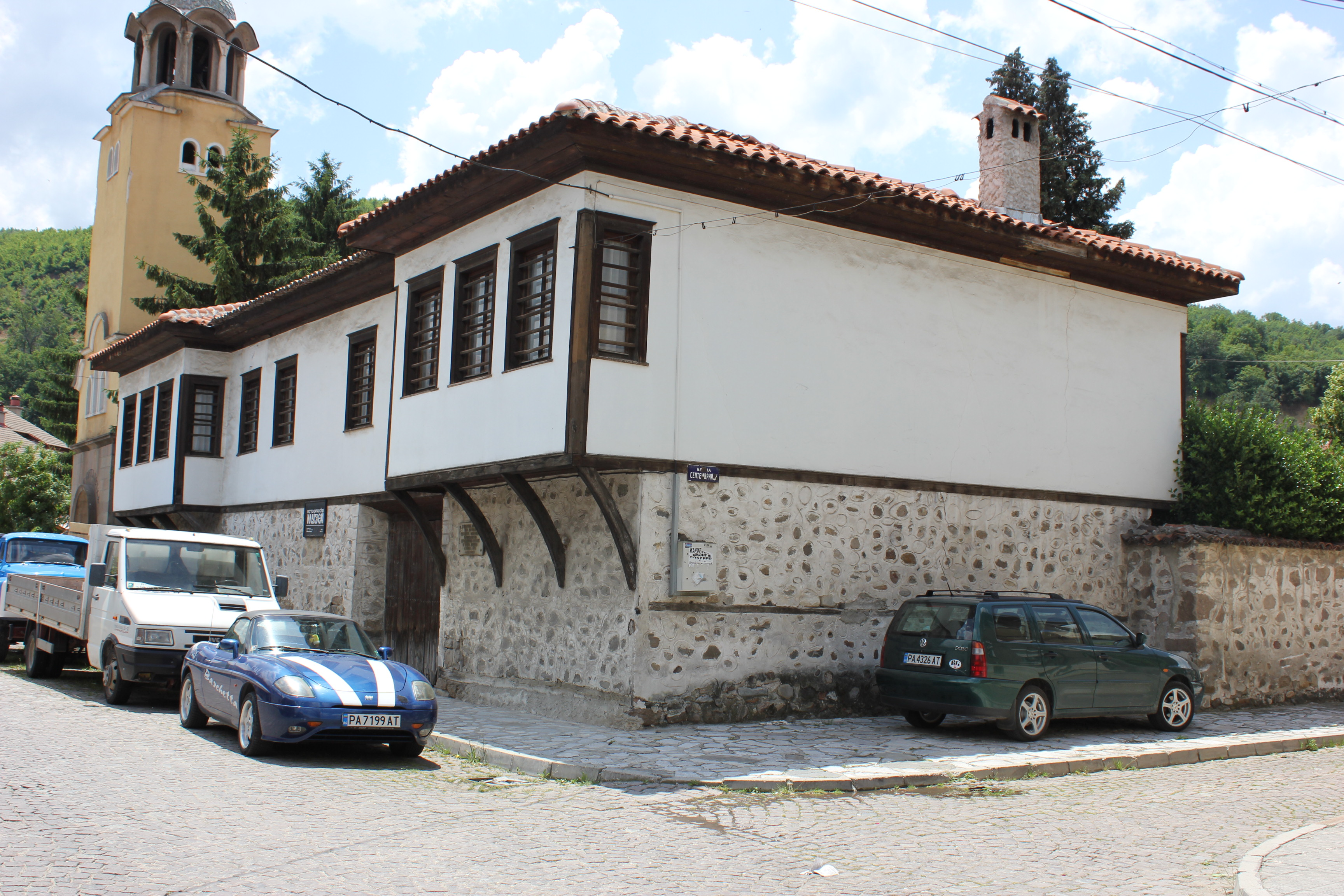 Сградата на историческия музей в град Пещера, България.